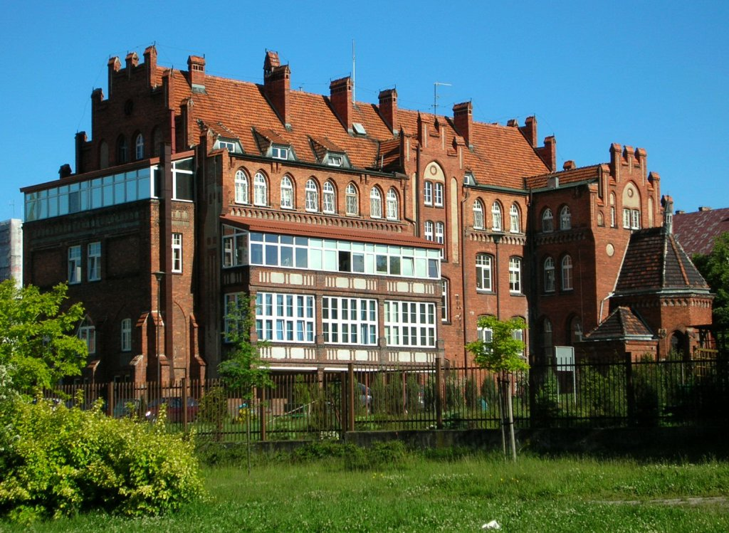 Szpital obserwacyjno-zakaźny Bydgoszcz